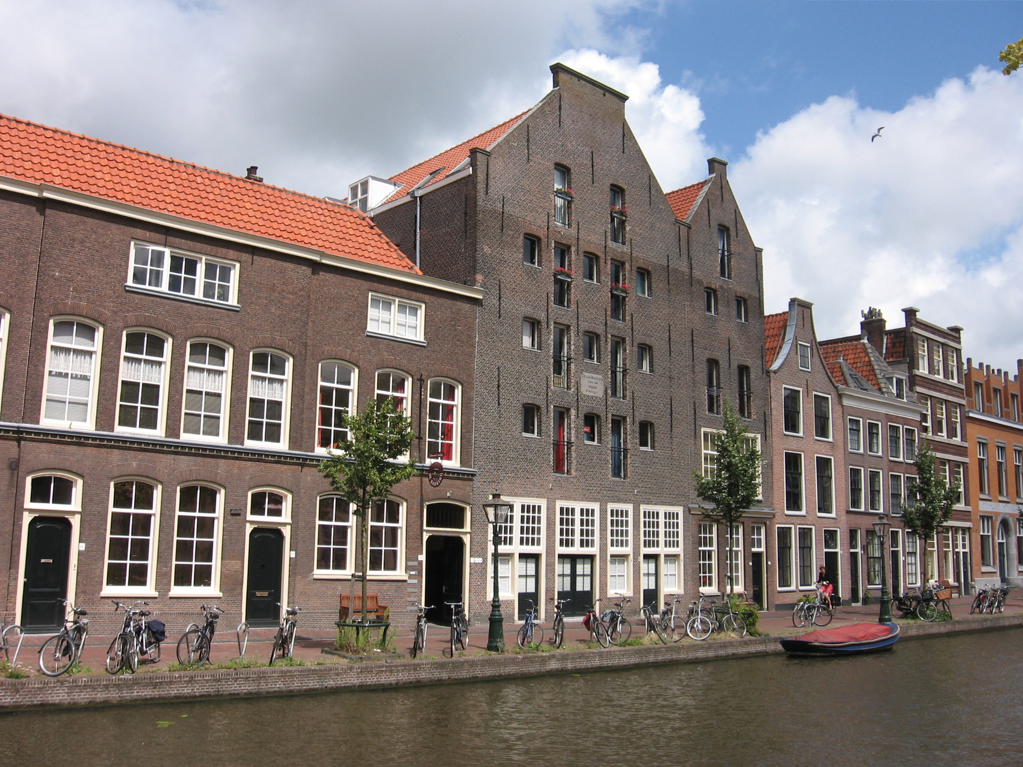 Graanmagazijn Oude Rijn Leiden.jpg Gevelsteen: "graan-magazijn voor den armen, ao MDCCLIV". Oude Rijn 44